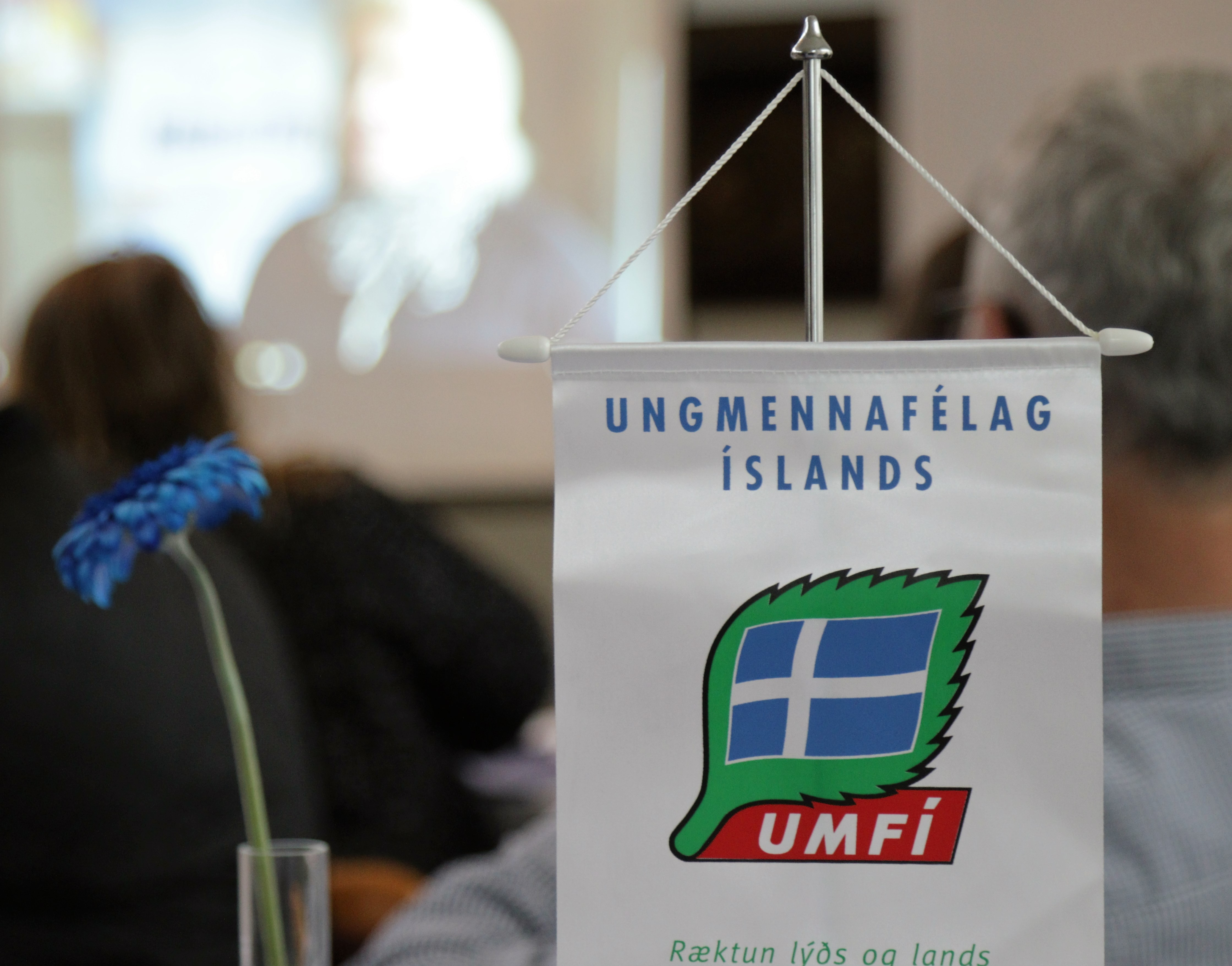 Fáni Ungmennafélags Íslands - Landssambands ungmennafélaga.